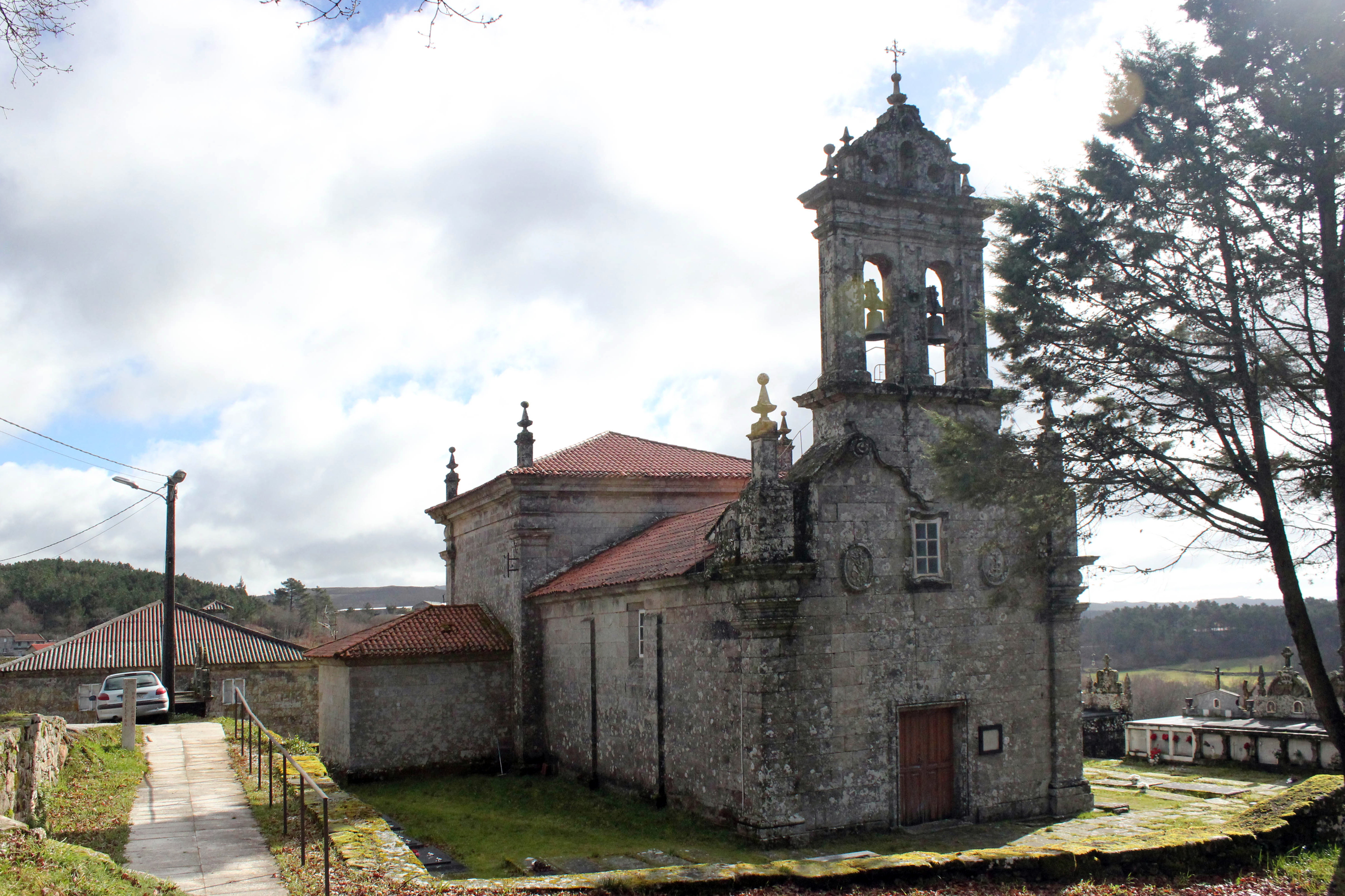 Igrexa de Santa María do Desterro da Corna, no concello da Piñor.